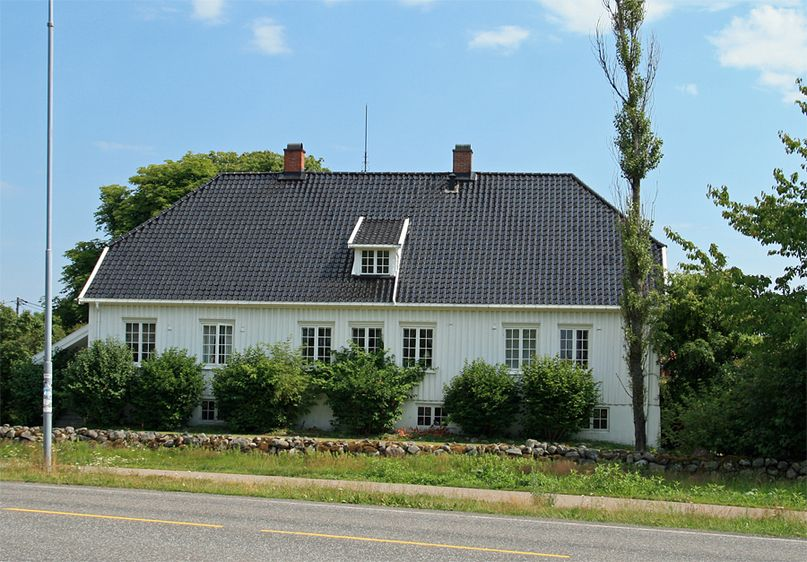 Tjølling prestegård. Foto: Lars Mæhlum, fra Riksantikvarens Kulturminnesøk.